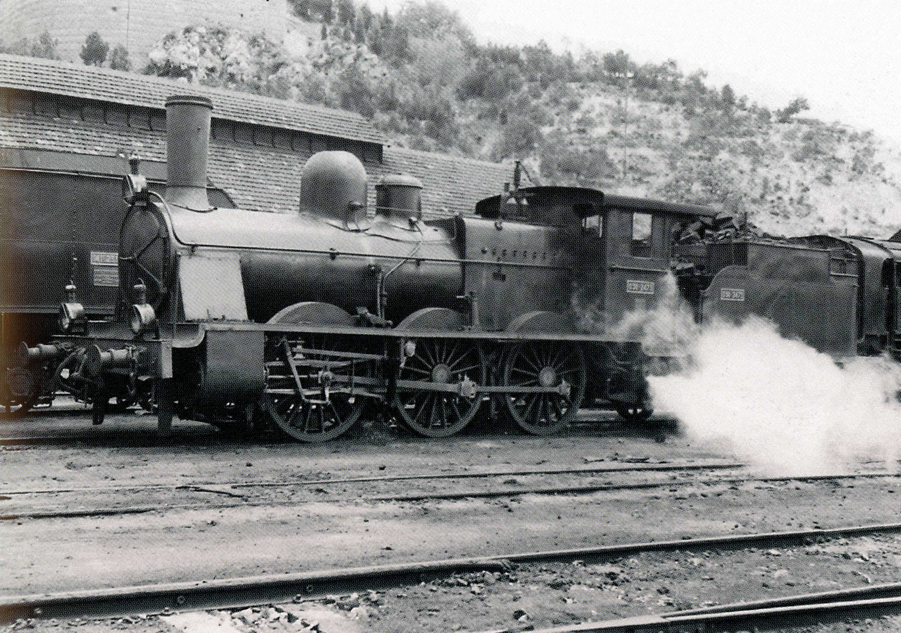 Locomotora de Vapor 030-2451